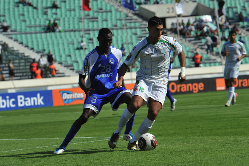 WAC vs Al Hilal Omdurman